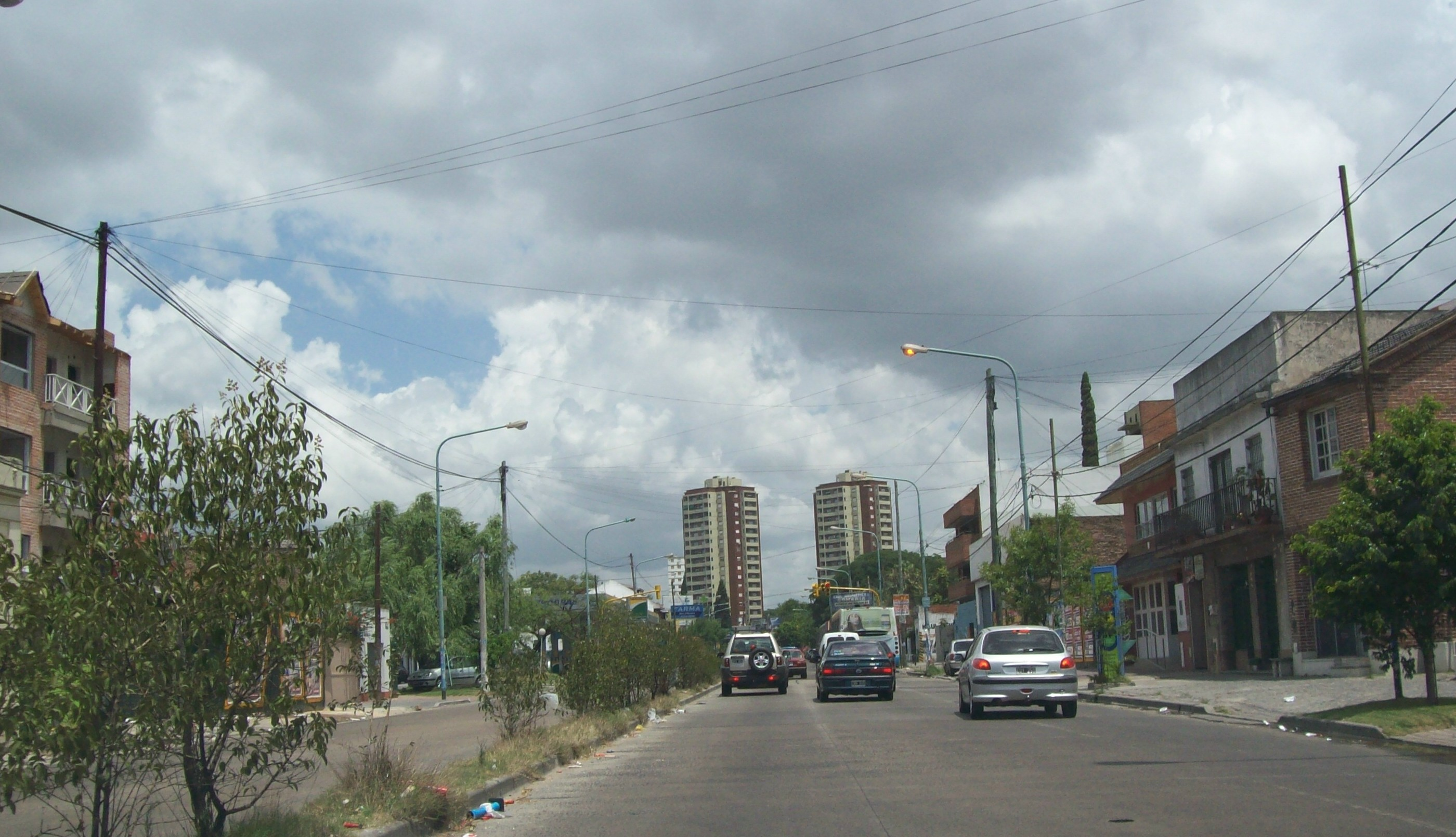 Avenida Almirante Brown hacia el sur en Lomas de Zamora, Gran Buenos Aires, Argentina.